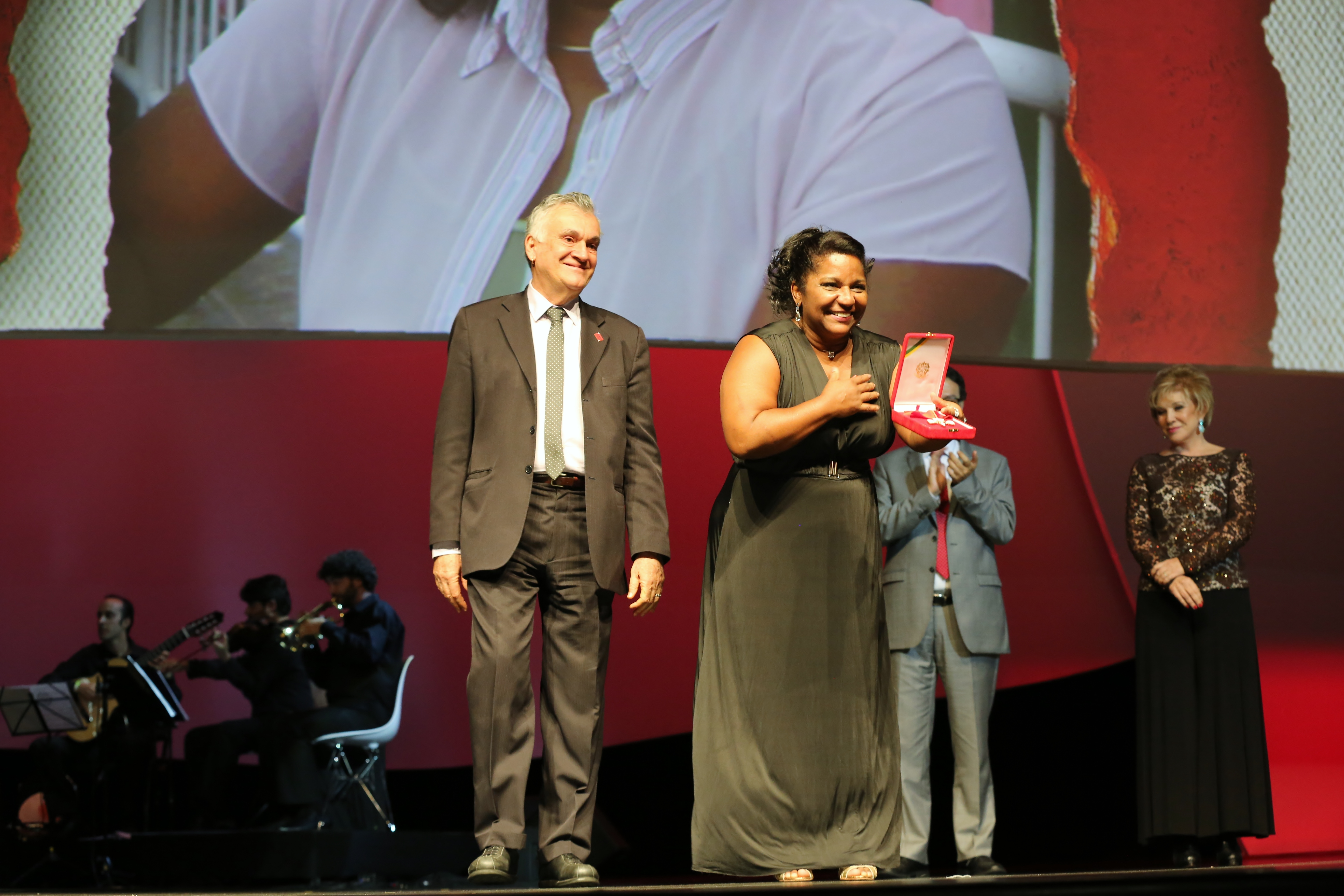 São Paulo (SP) | Ministério da Cultura celebra a Ordem do Mérito Cultural 2013. Na foto: Nilcemar Nogueira recebe a medalha 05.11.2013 Foto: Elisabete Alves